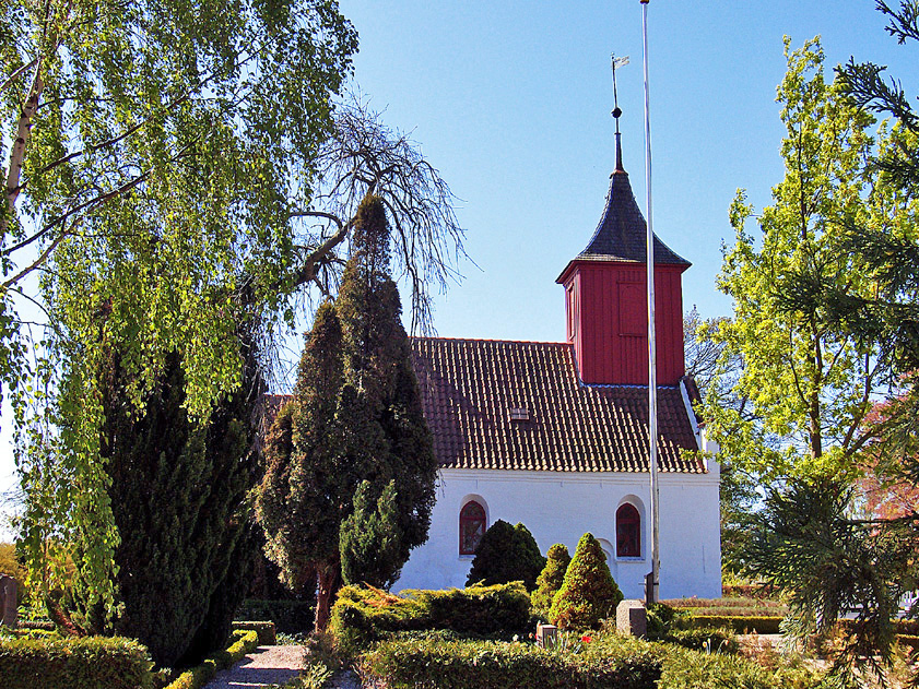 fra nord